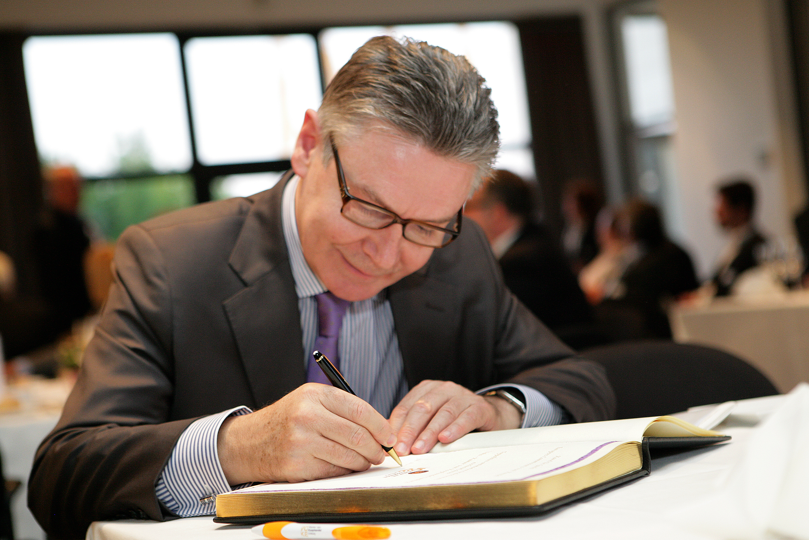 Toppolitici ontmoeten ondernemers - Karel De Gucht